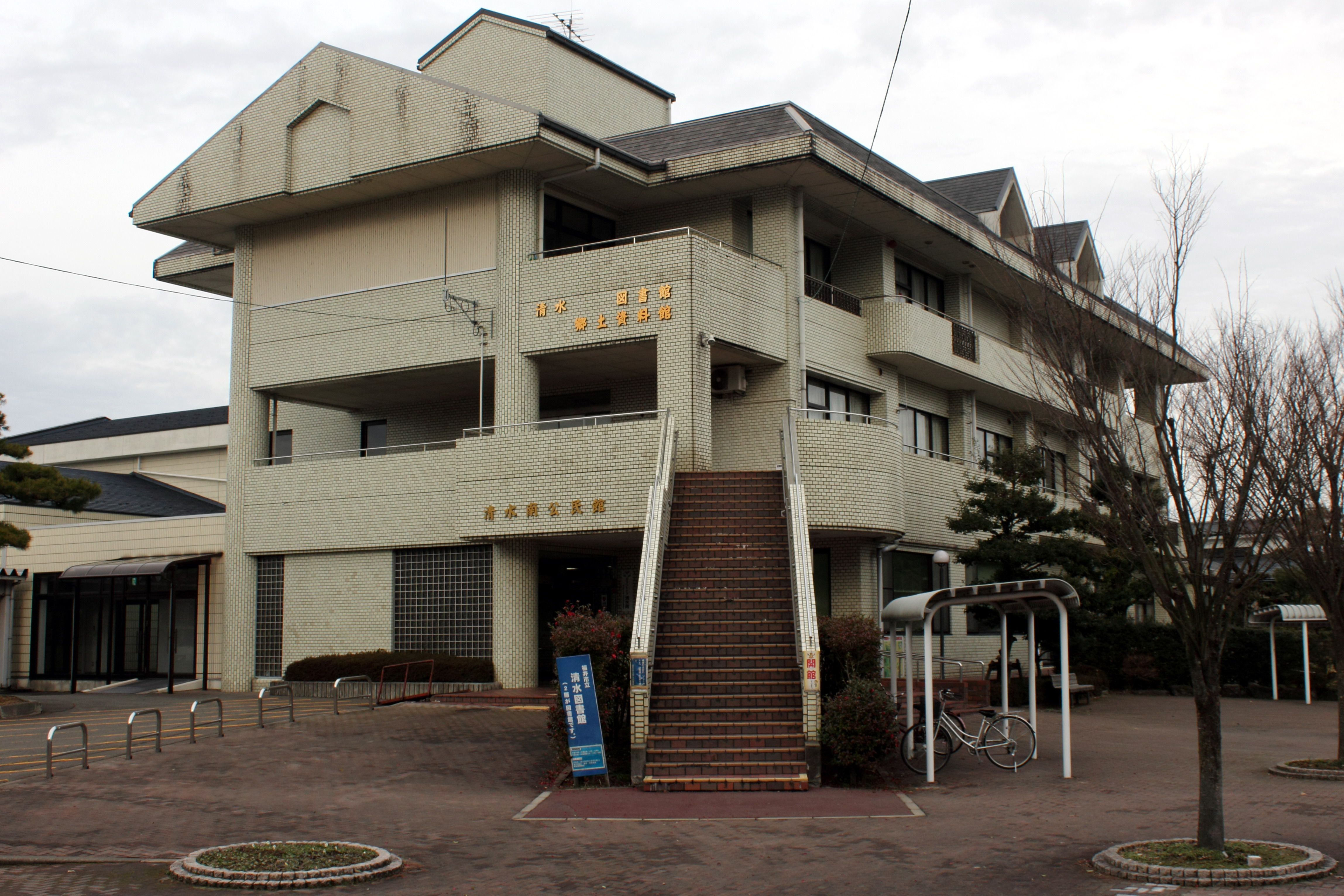 福井市立清水図書館